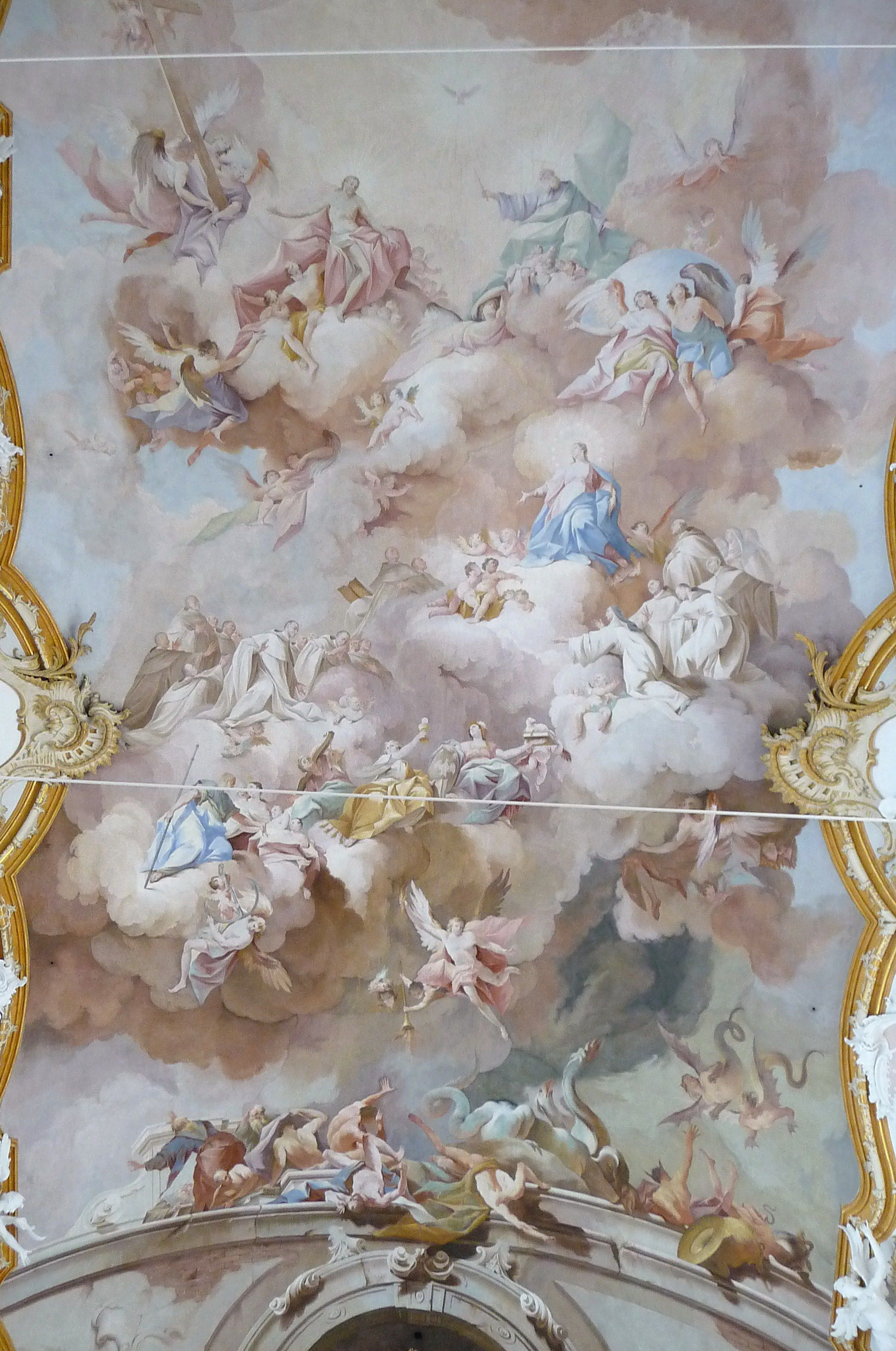 Das 30 Meter lange und 15 Meter breite Deckenfresko von Johann Jakob Zeiller im Langhaus der Pfarrkirche Fürstenzell.